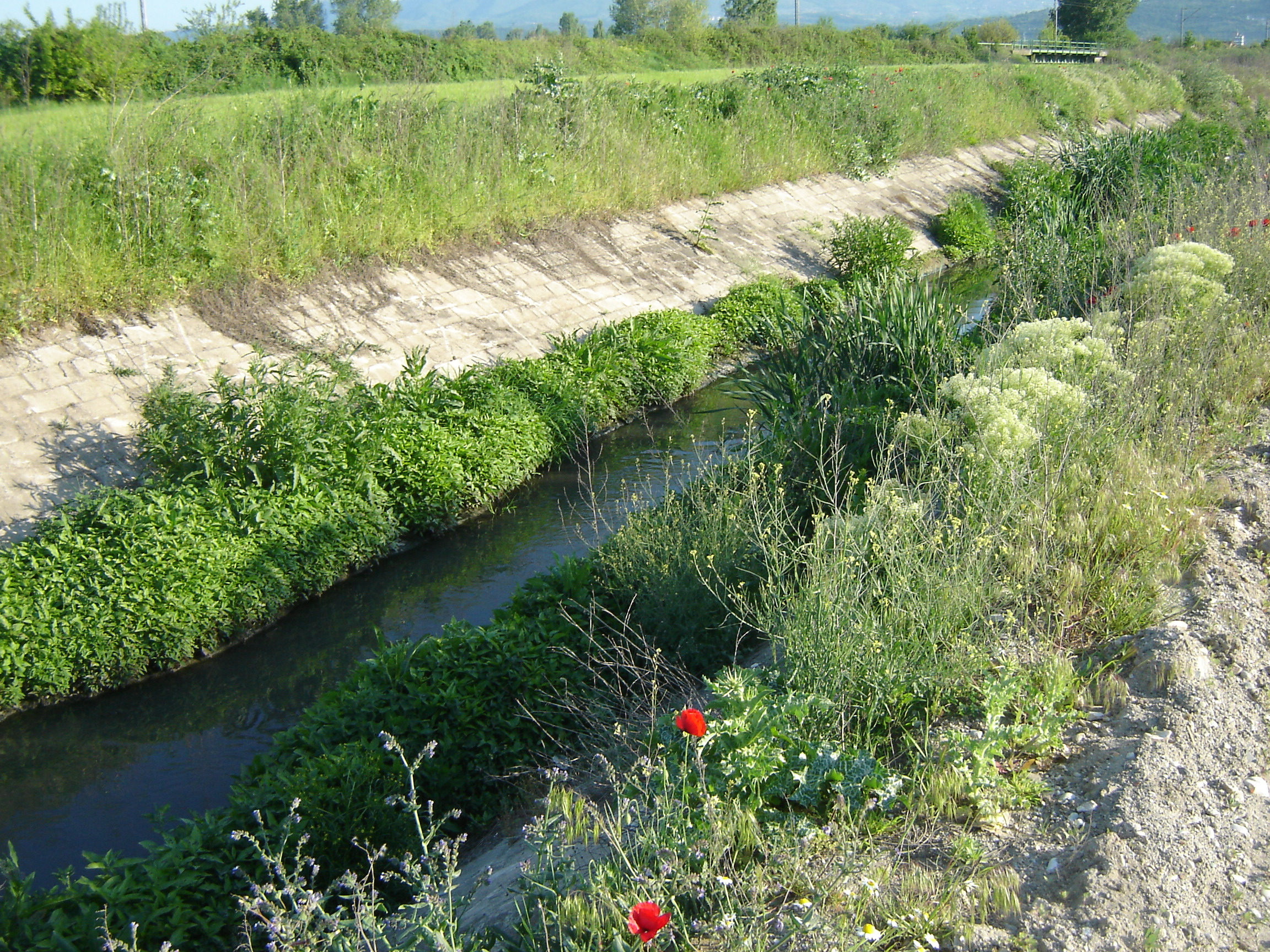 Усјанскиот Канал (јаз) пред вливот во Вардар.